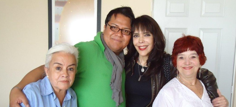 Aqui el primer dia de grabacion del programa por internet de Maria Luisa Alcalá